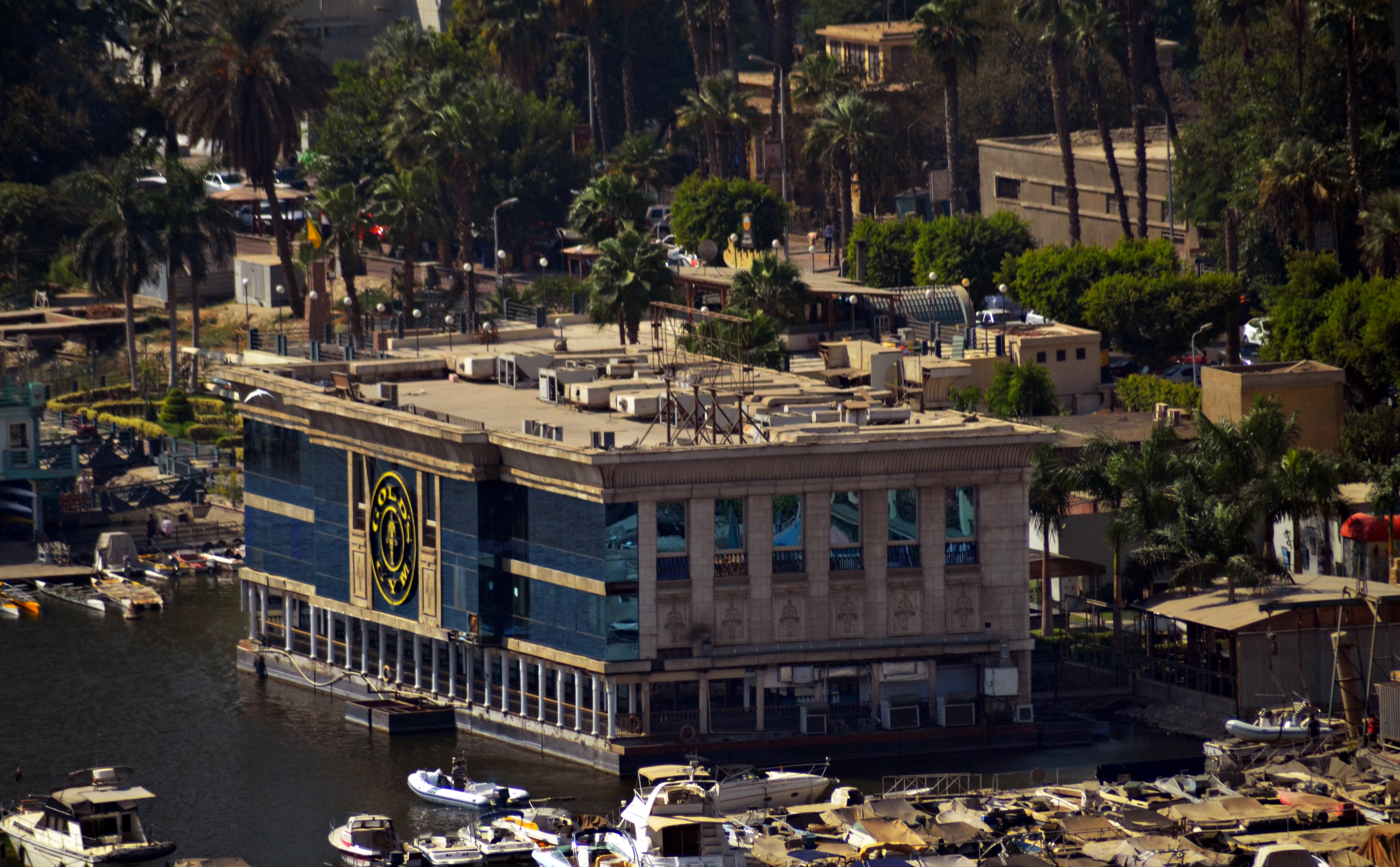 جولدز جيم، الدقي، الجيزة.